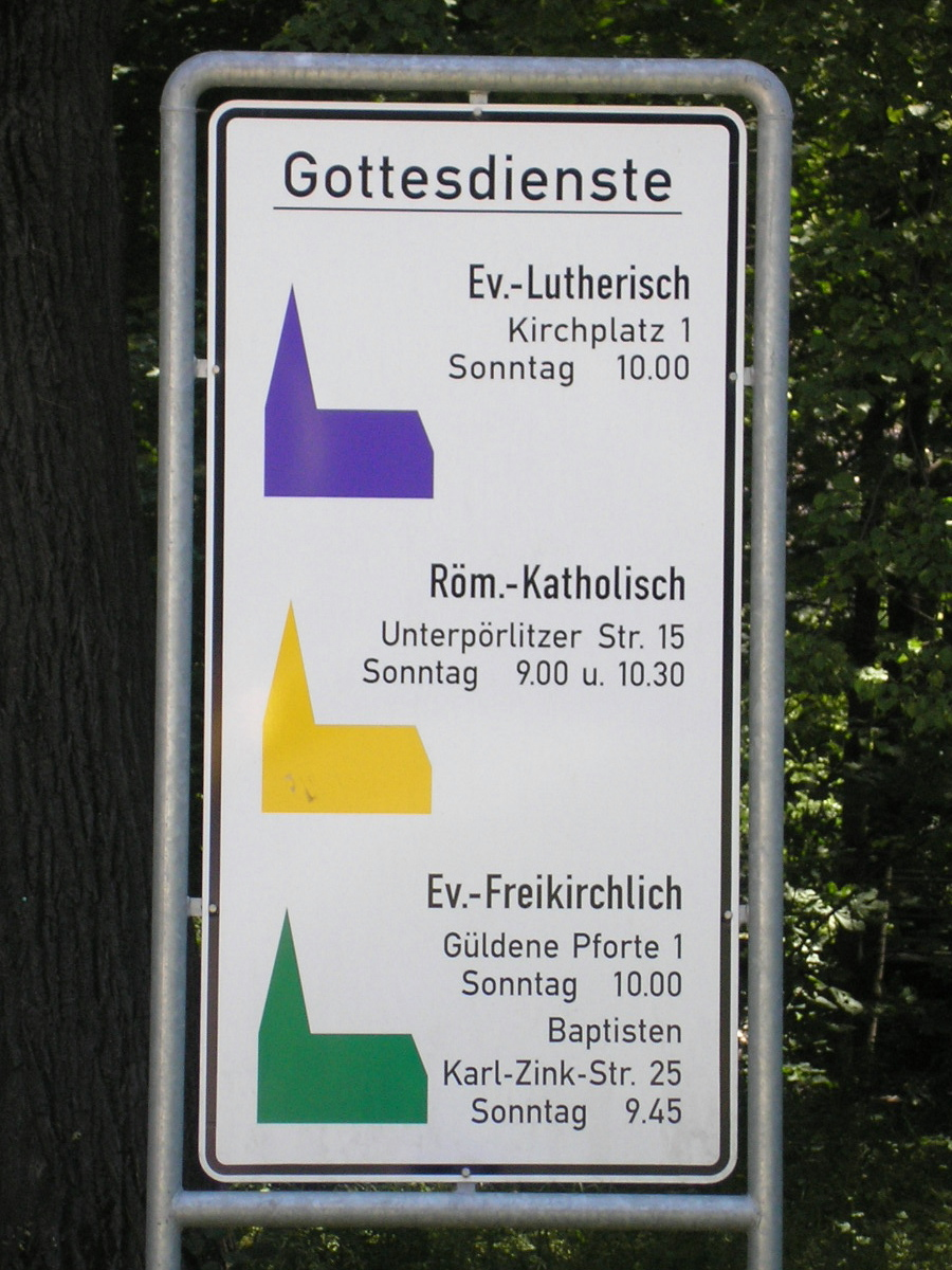 Übersichtstafel mit Gottesdiensten verschiedener Religionsgemeinschaften am Ortseingang von Ilmenau (Thüringen).